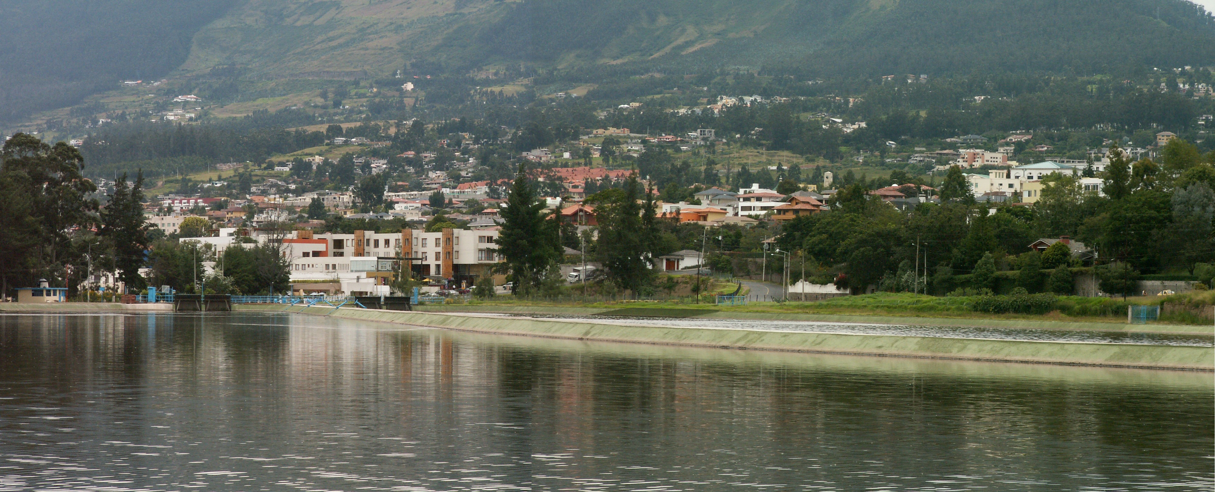 Cumbayá desde el reservorio